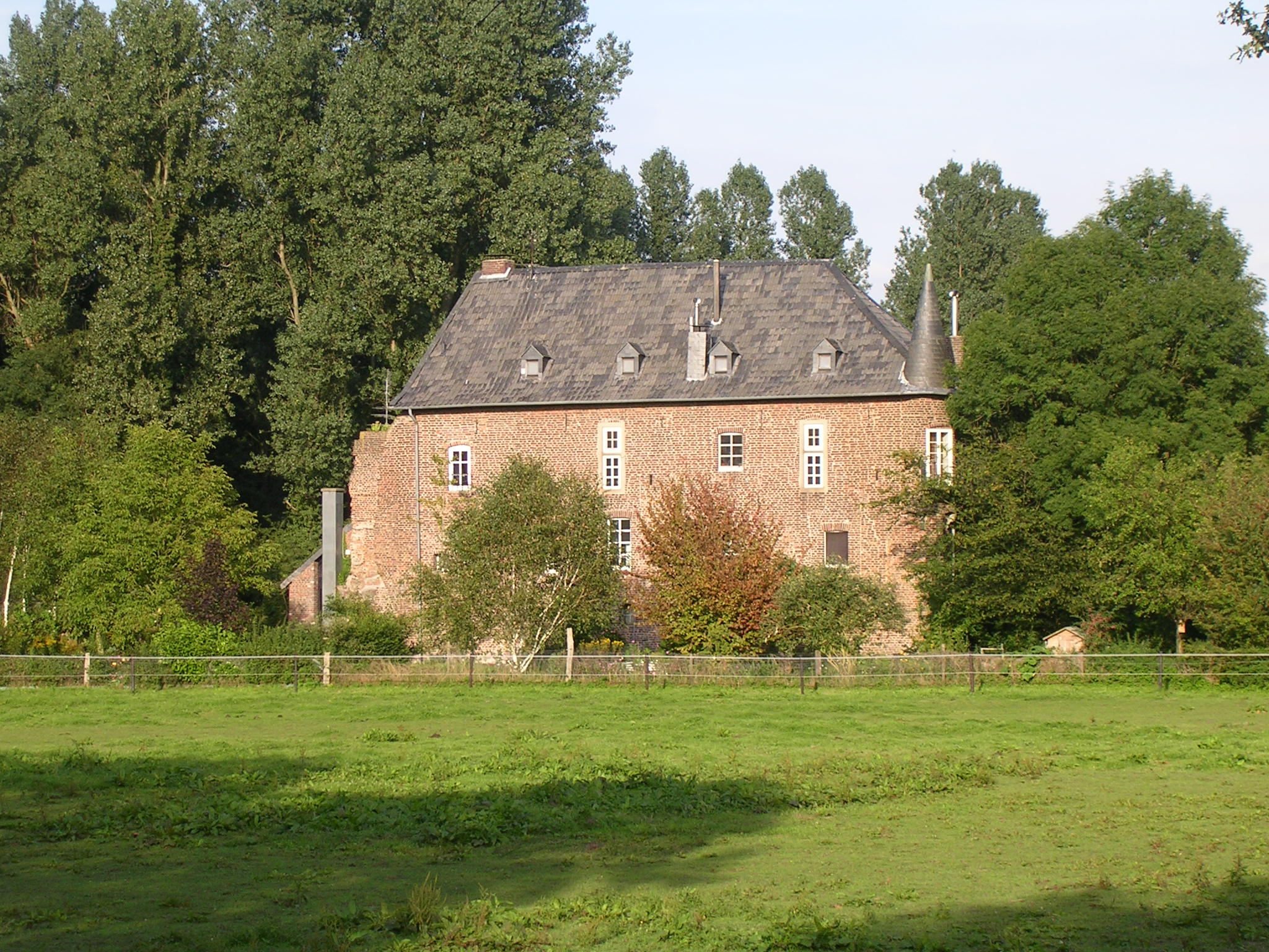 Haus Velde, Schmalbroich, Kempen This image shows a heritage building in Germany, located in the North Rhine-Westphalian city Kempen (no. 13).